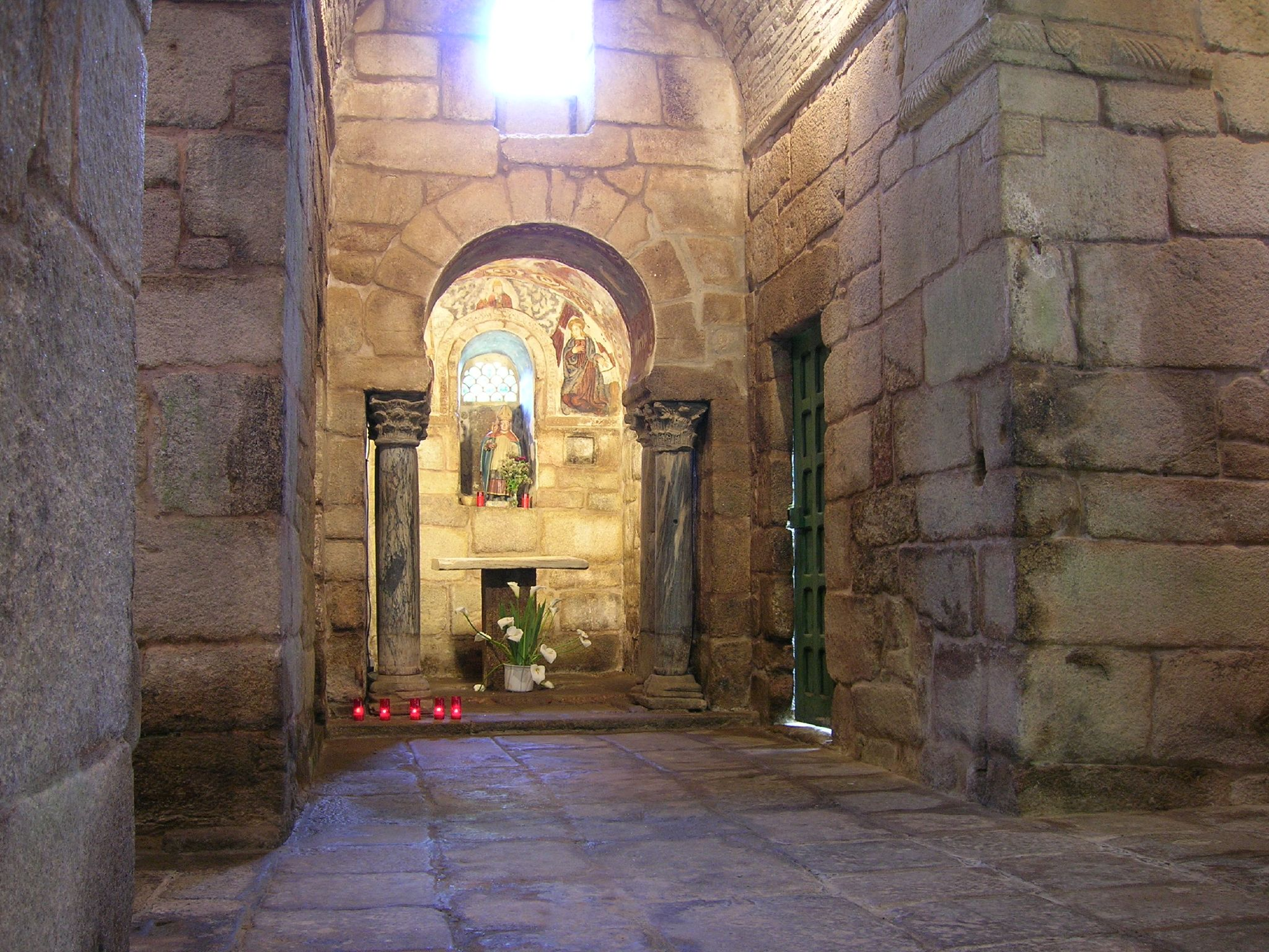 gl: Igrexa de Santa Comba de Bande